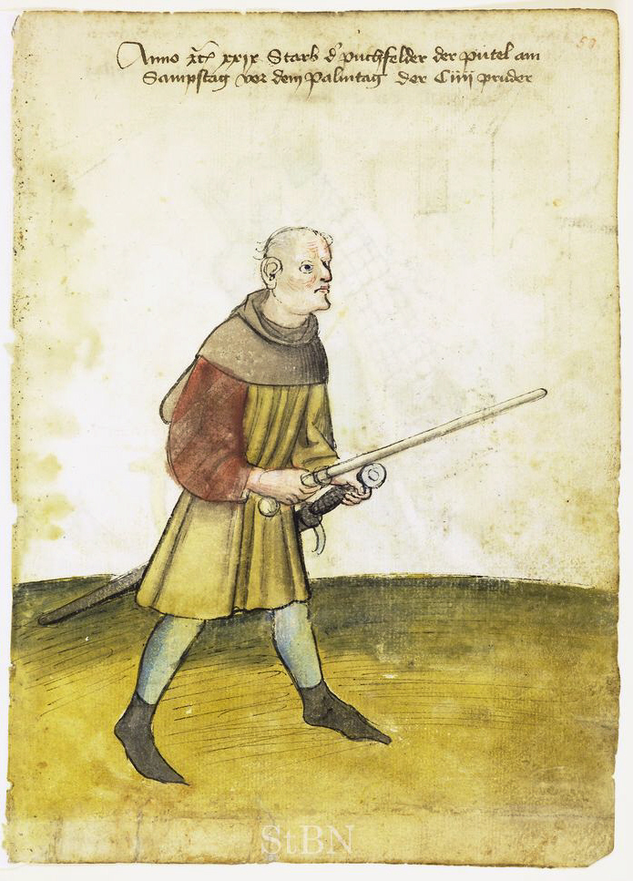 N.N. puchfelder (Buchfelder) , pütel (Büttel; Gerichtsbote; Fronbote) Transkription und weitere Informationen